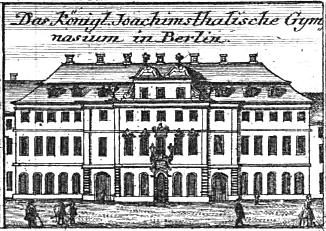 Aus Schleuens Berliner Plan von 1757 entnommen